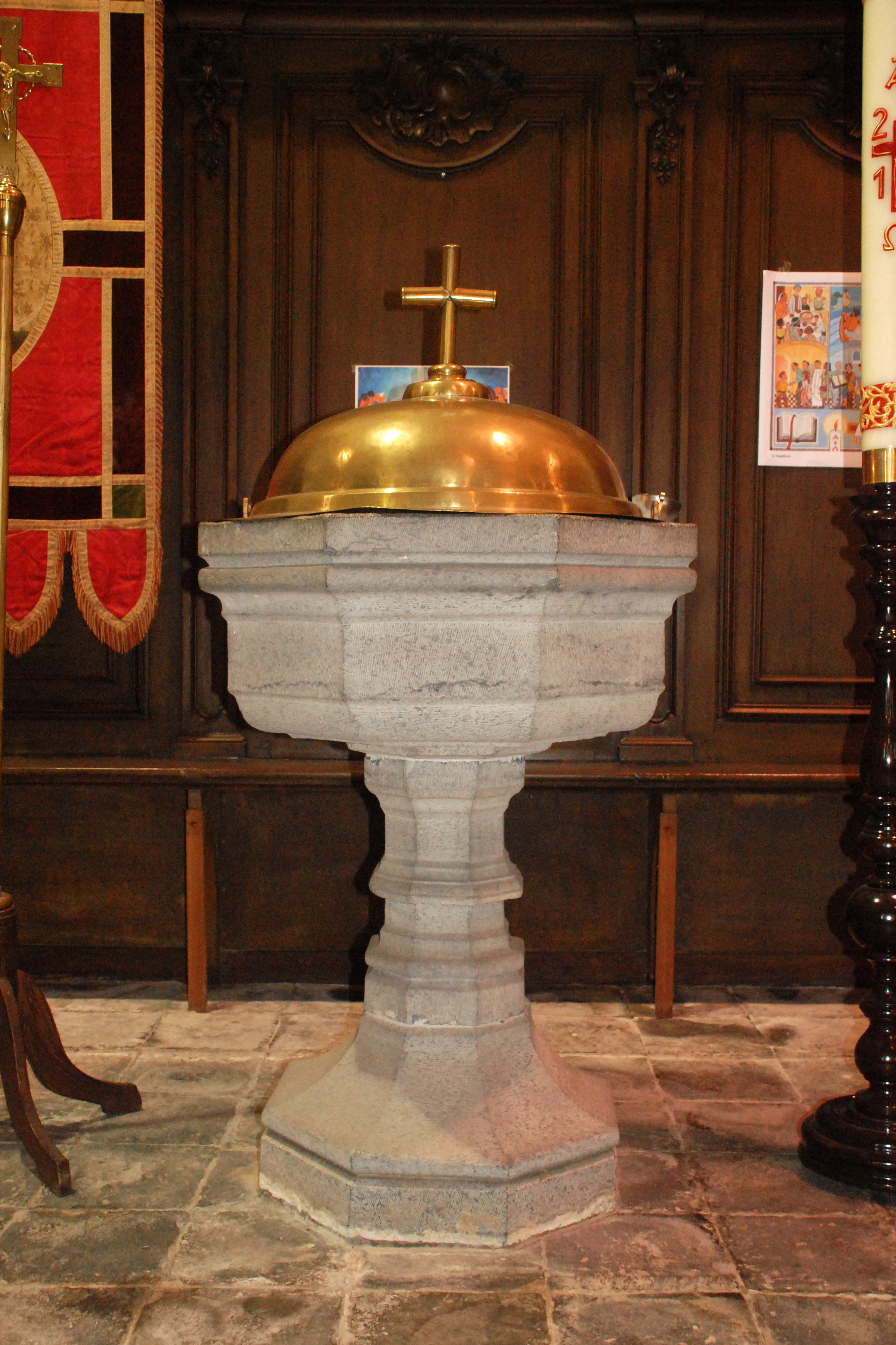 Belgique - Brabant wallon - Église Saint-Martin de Ways